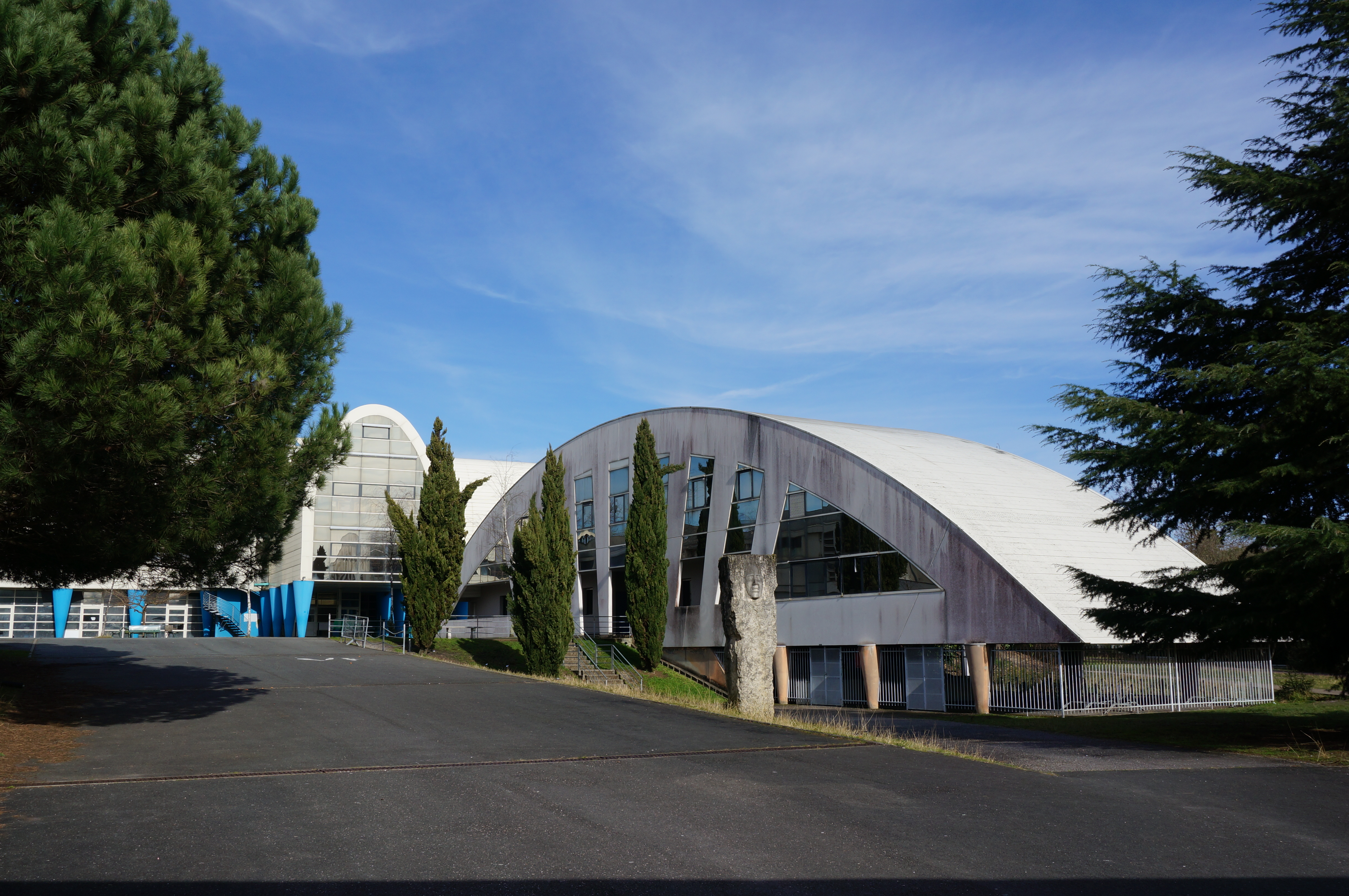 Collège Jules Ferry en février, Mérignac, Gironde.